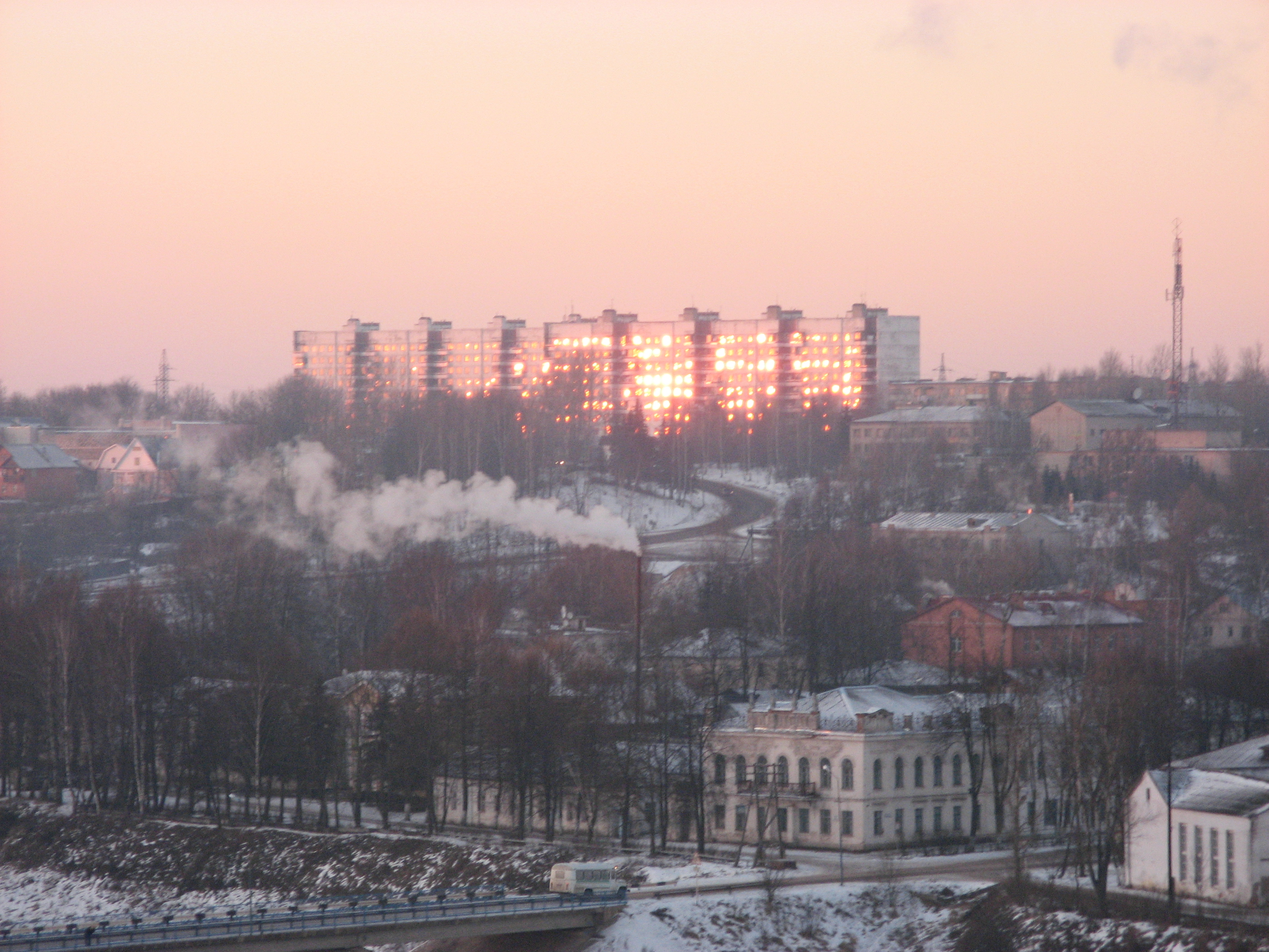 Зубцов зимой.